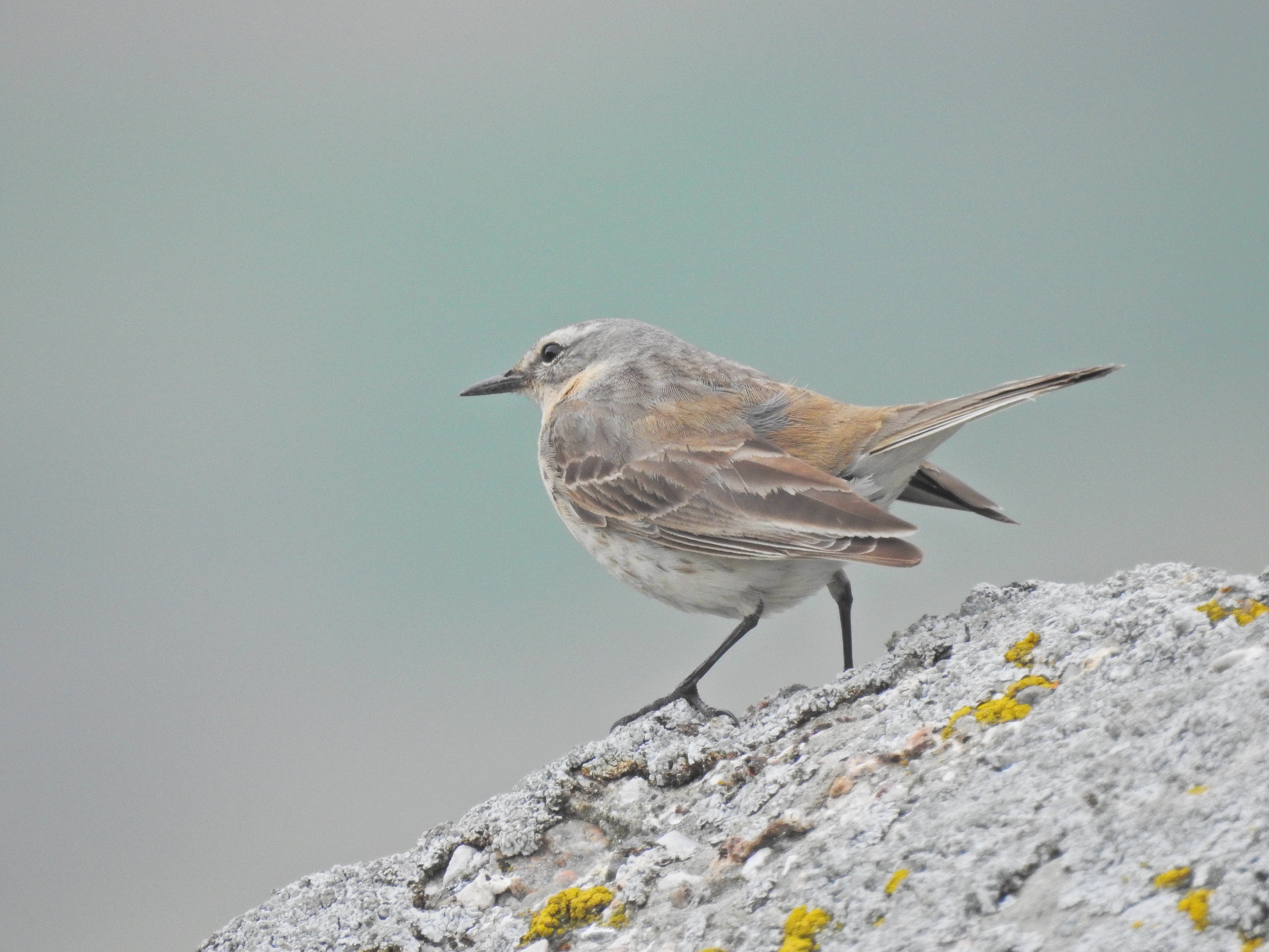 water pipit Bergpieper / Wasserpieper fâsă de munte